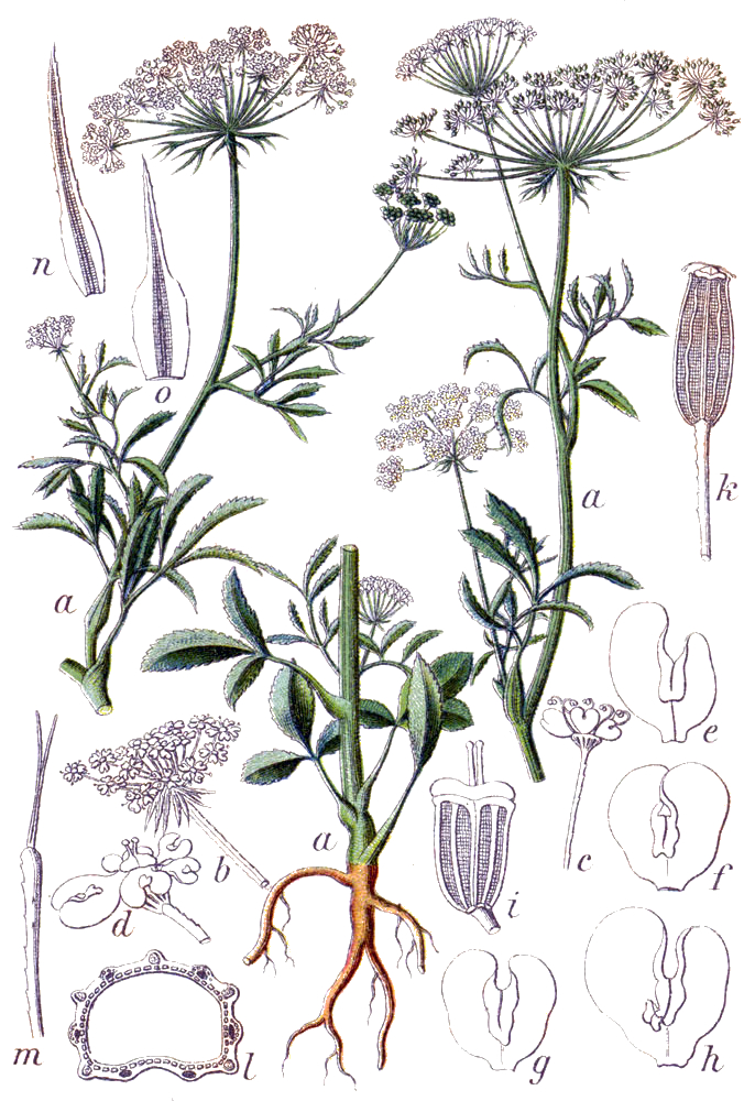 Ammi majus L. Original Caption Grosses Ammei, Ammi majus